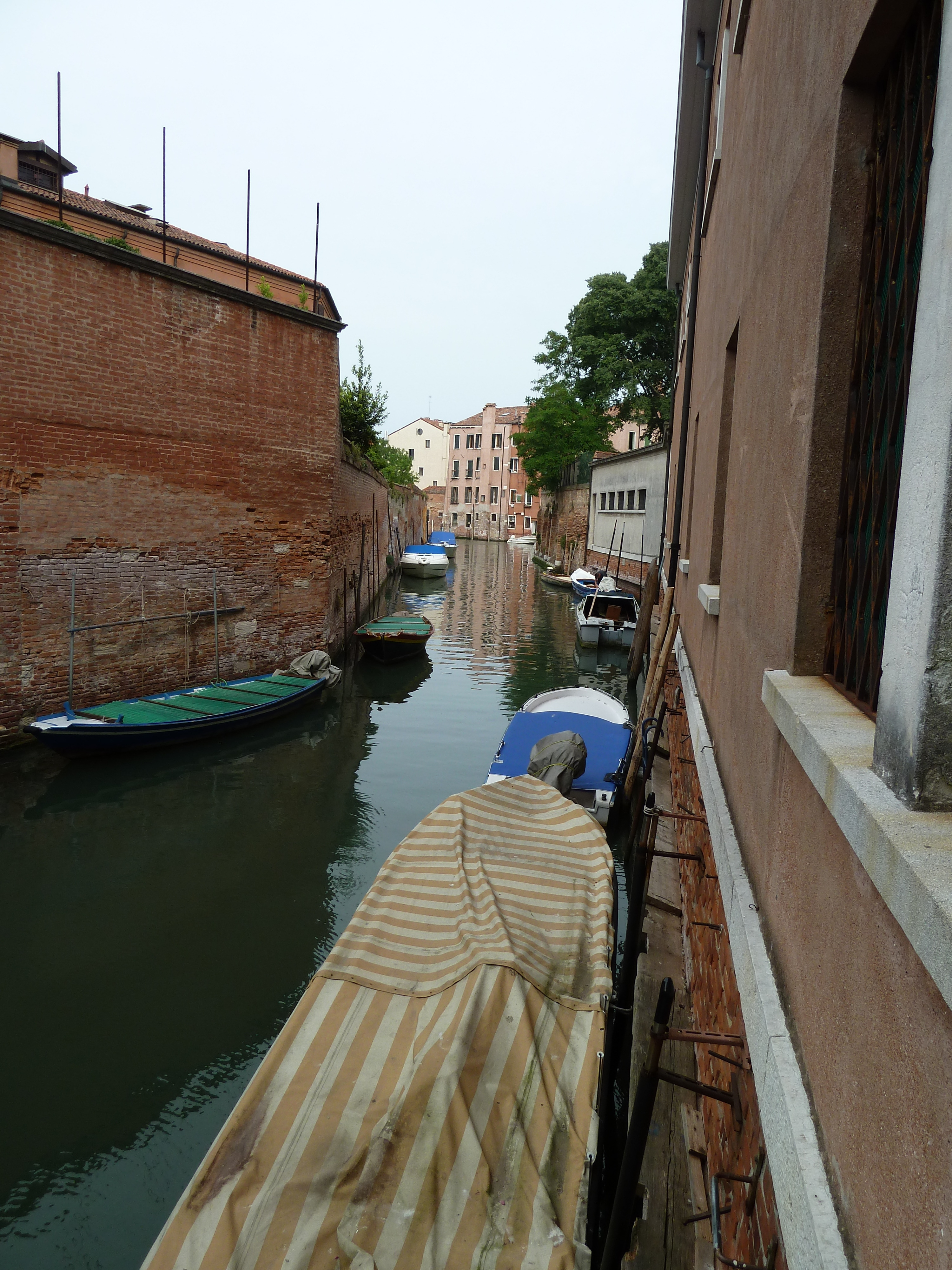 rio batelo